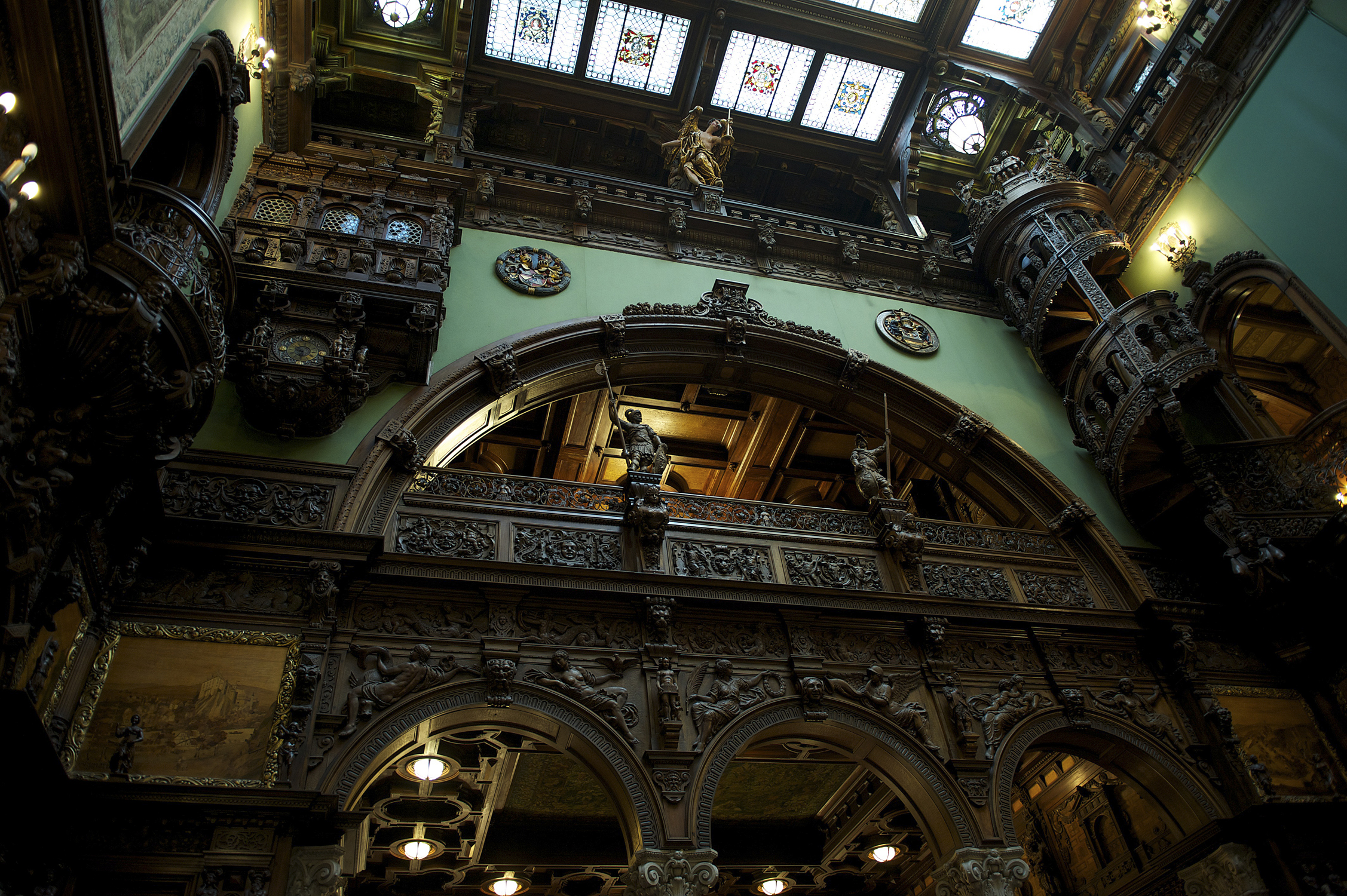 Castelul Peleș 01